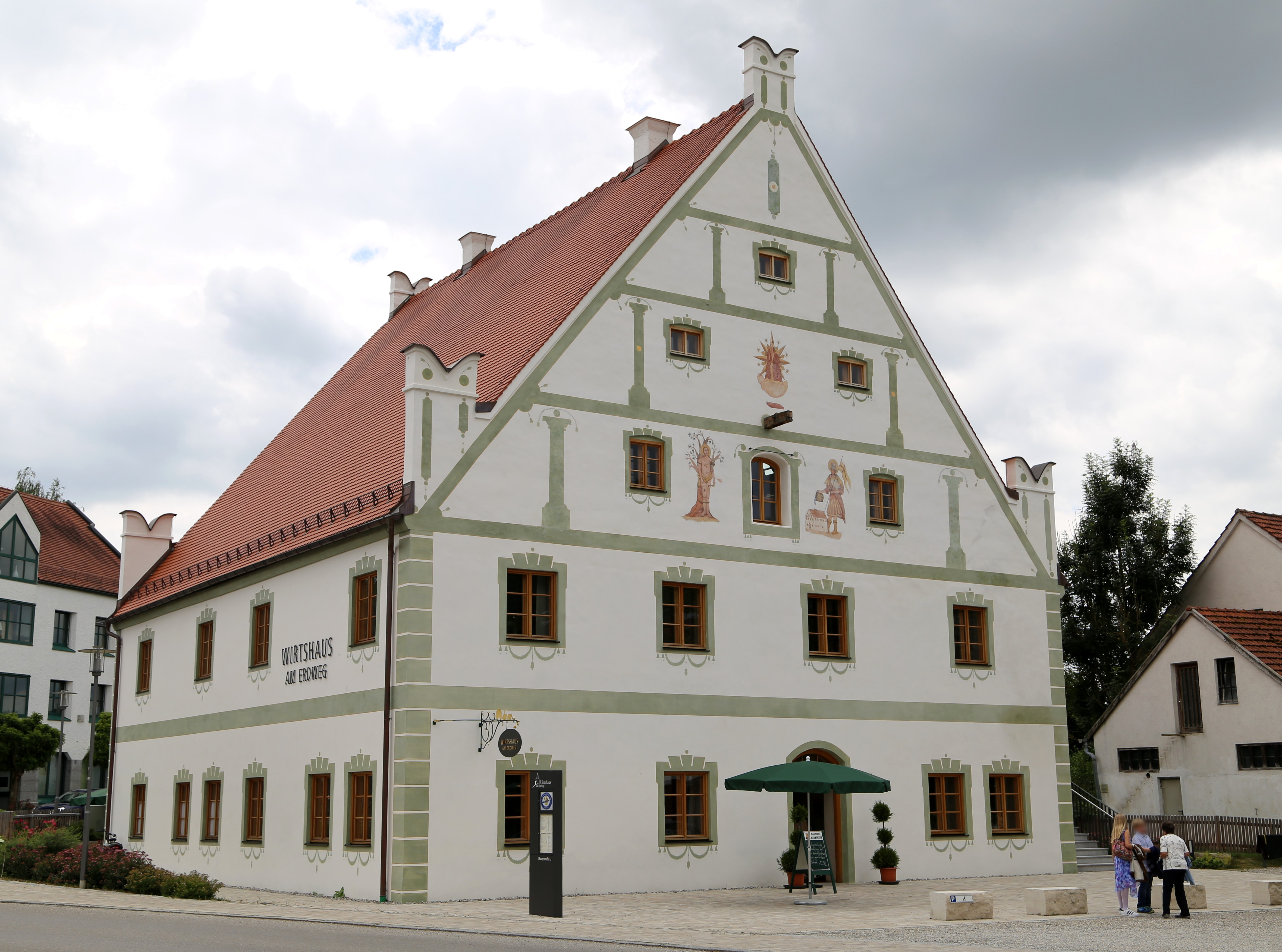 Hauptstraße 14, Erdweg; Gasthof, stattlicher Satteldachbau mit Schwalbenschwanzzinnen, im Kern 16. Jahrhundert, später verändert.